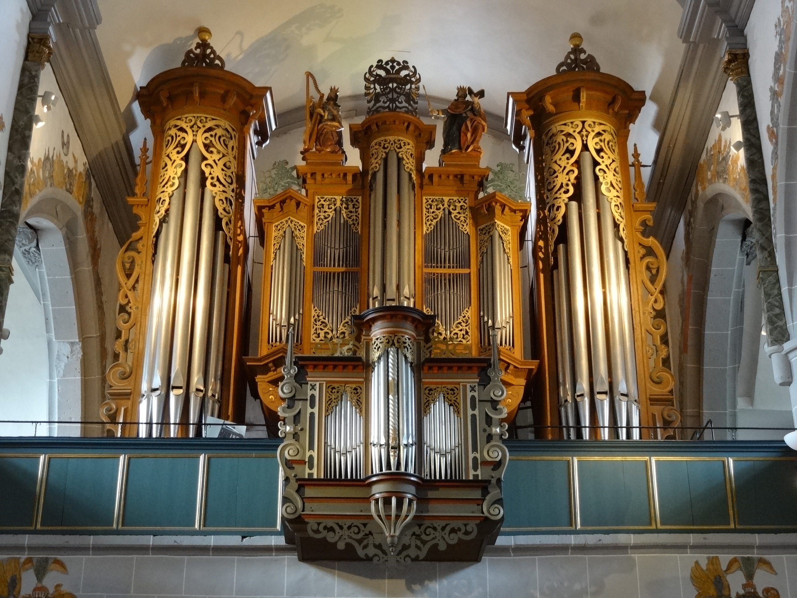 Marienstiftskirche Lich